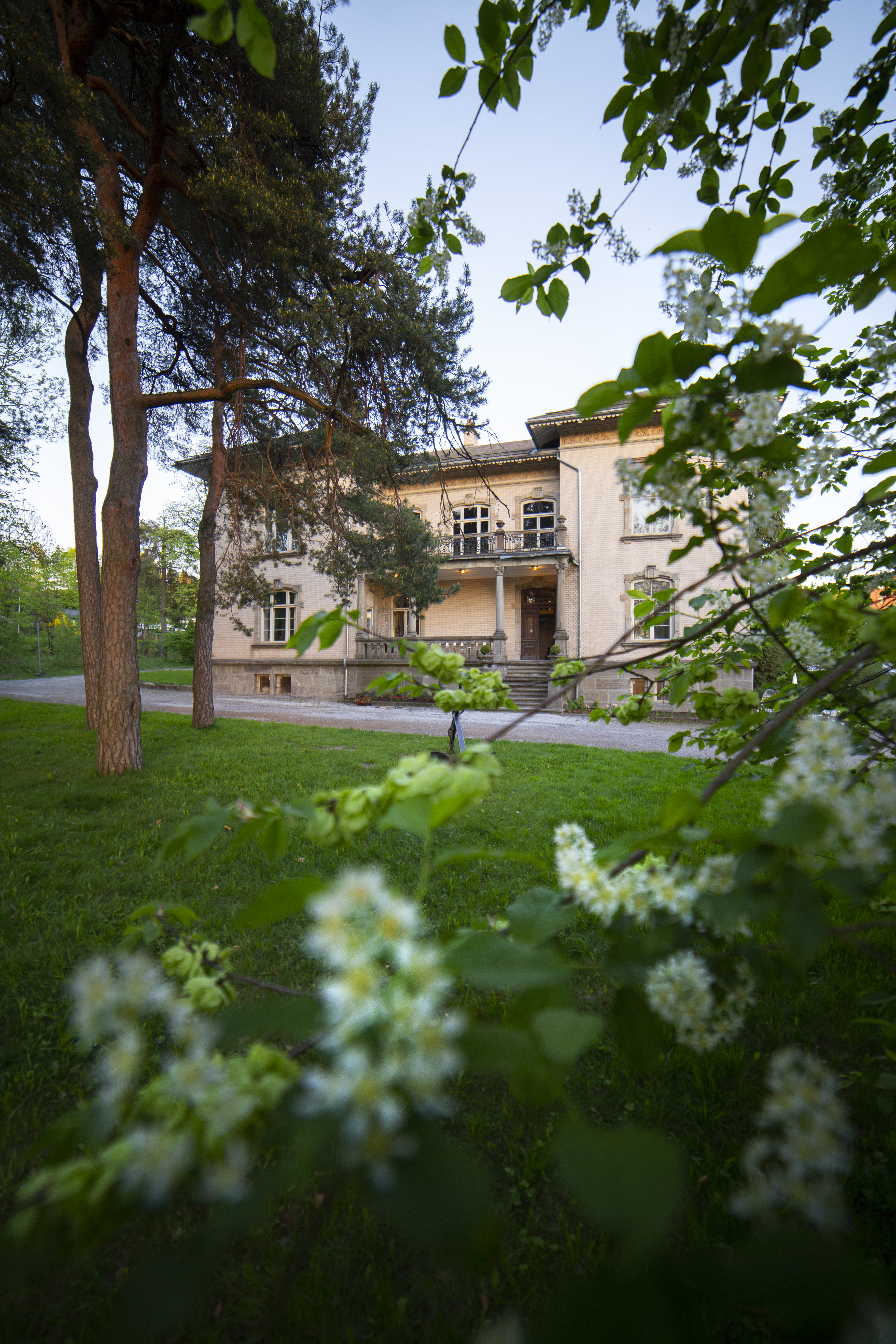 Villa Frednes hovedinngang